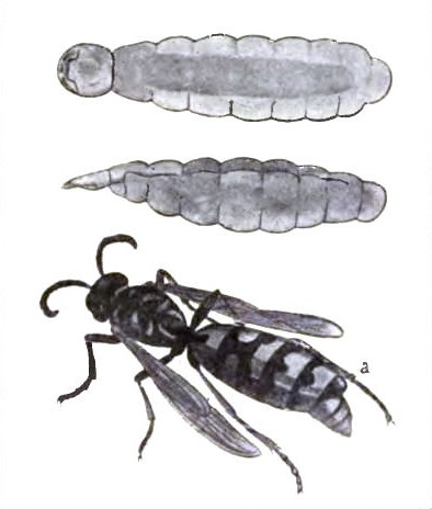 Female strepsipteran